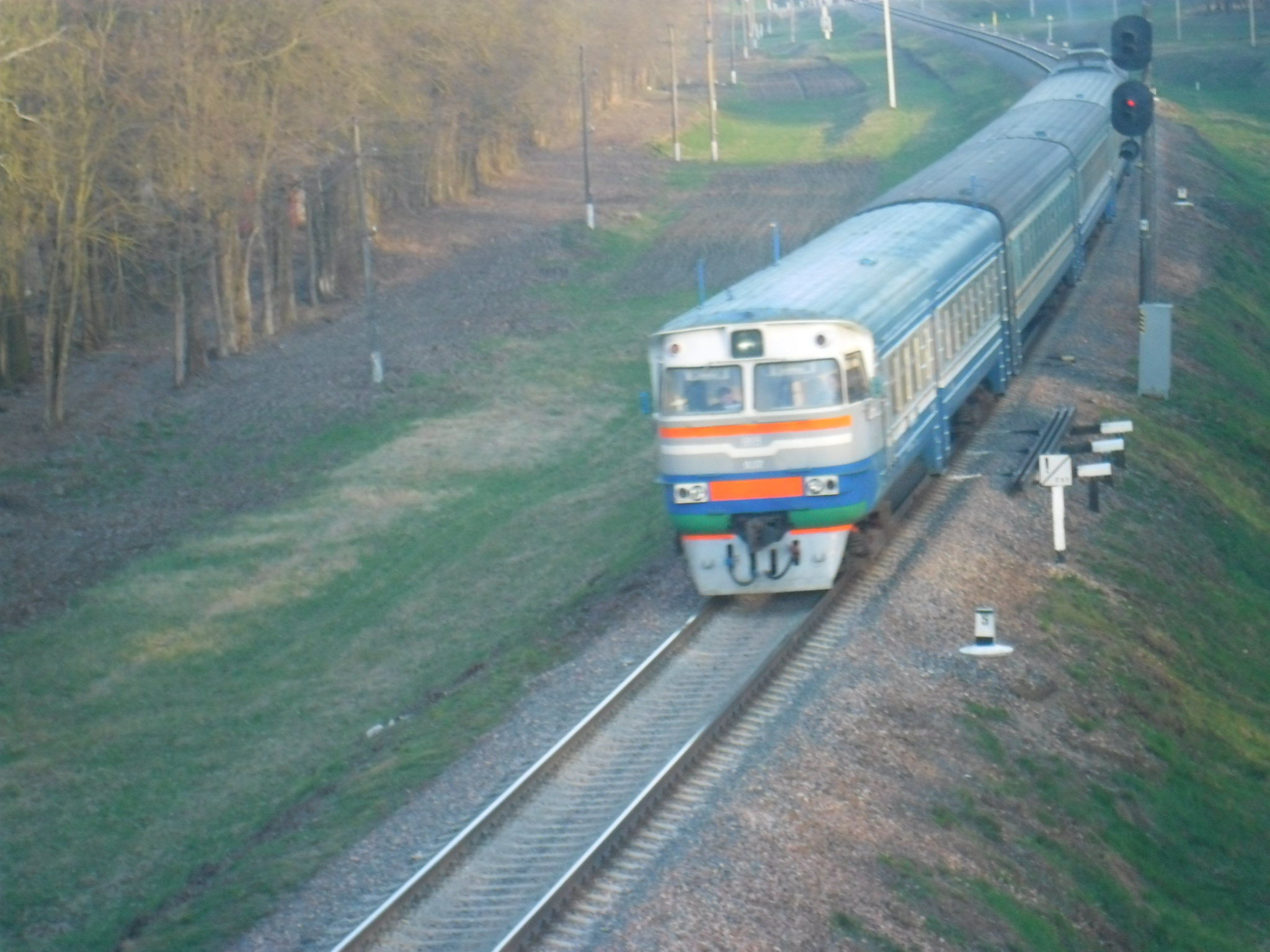 Поезд